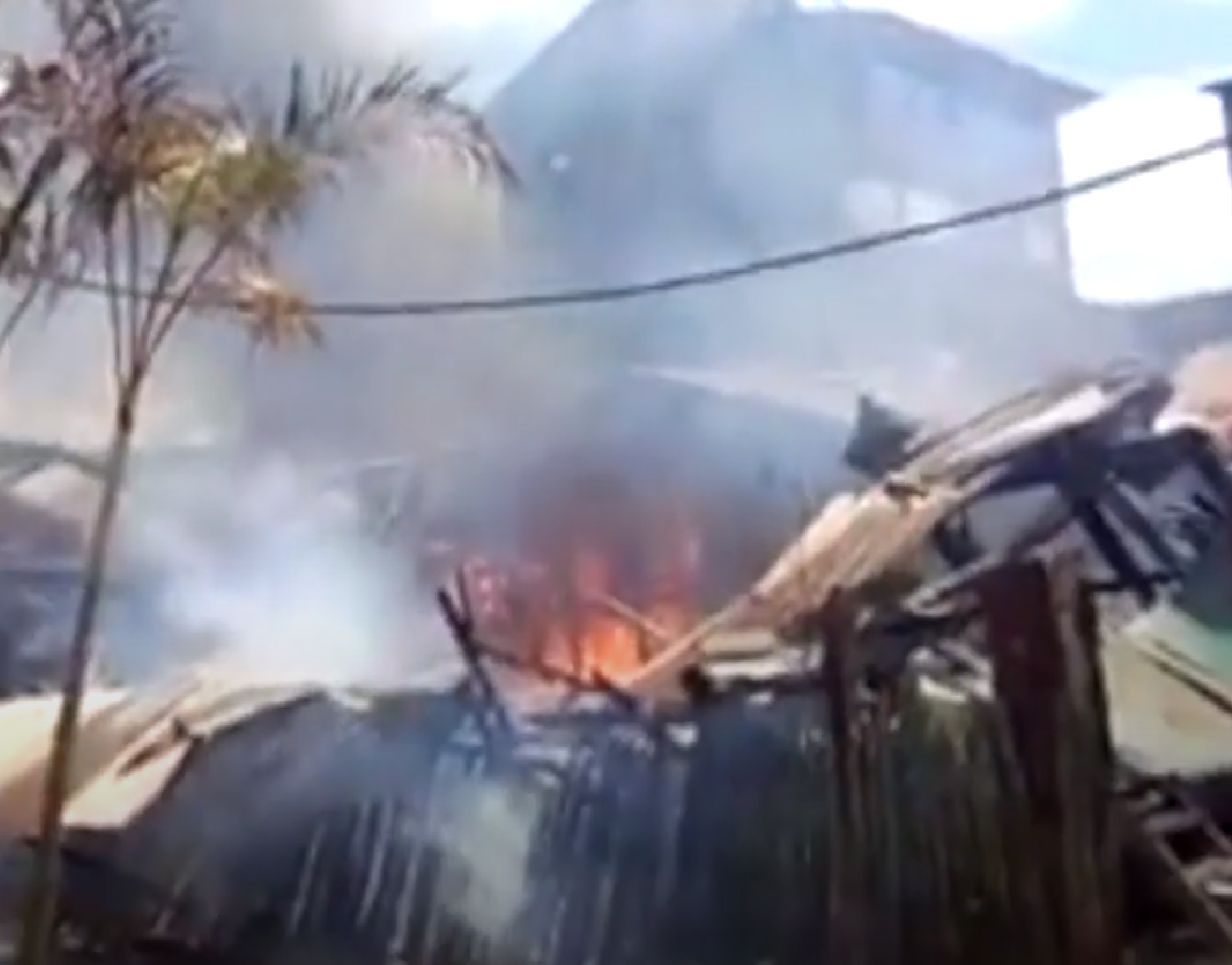 Pobladores del Marañon exigen justicia por el feminicidio de la periodista IsabelAlvarado. Periodistas en la zona reportan la quema de una Comisaría y un patrullero.